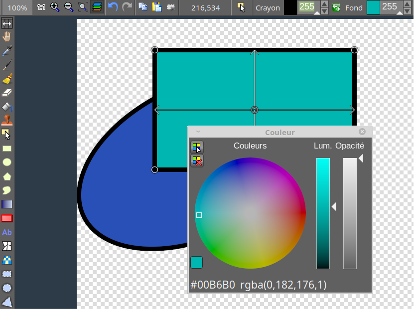 Sélection d'une forme vectorielle dans LazPaint 7